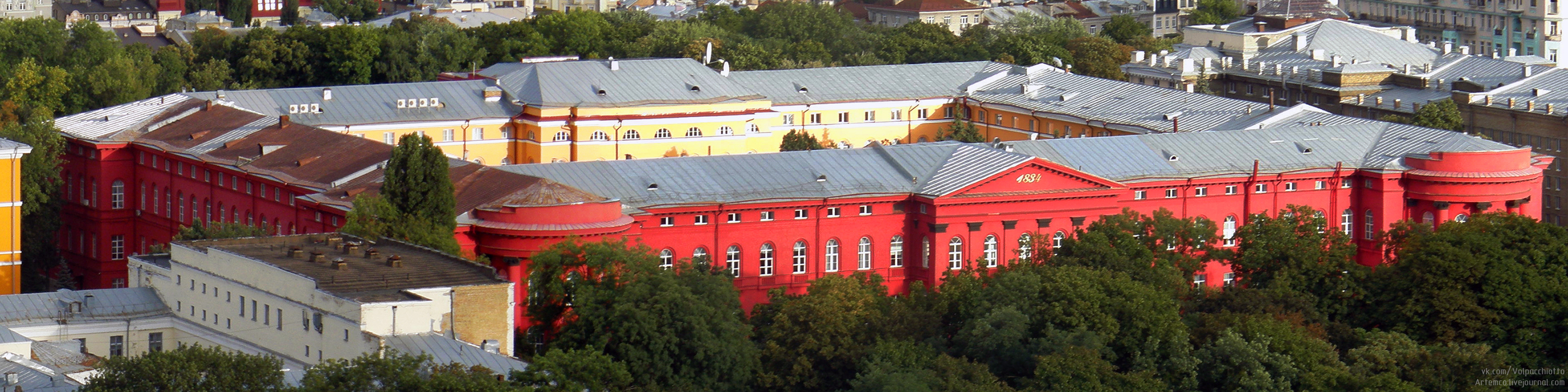 западный и северный фасады Красного корпуса киевского университета